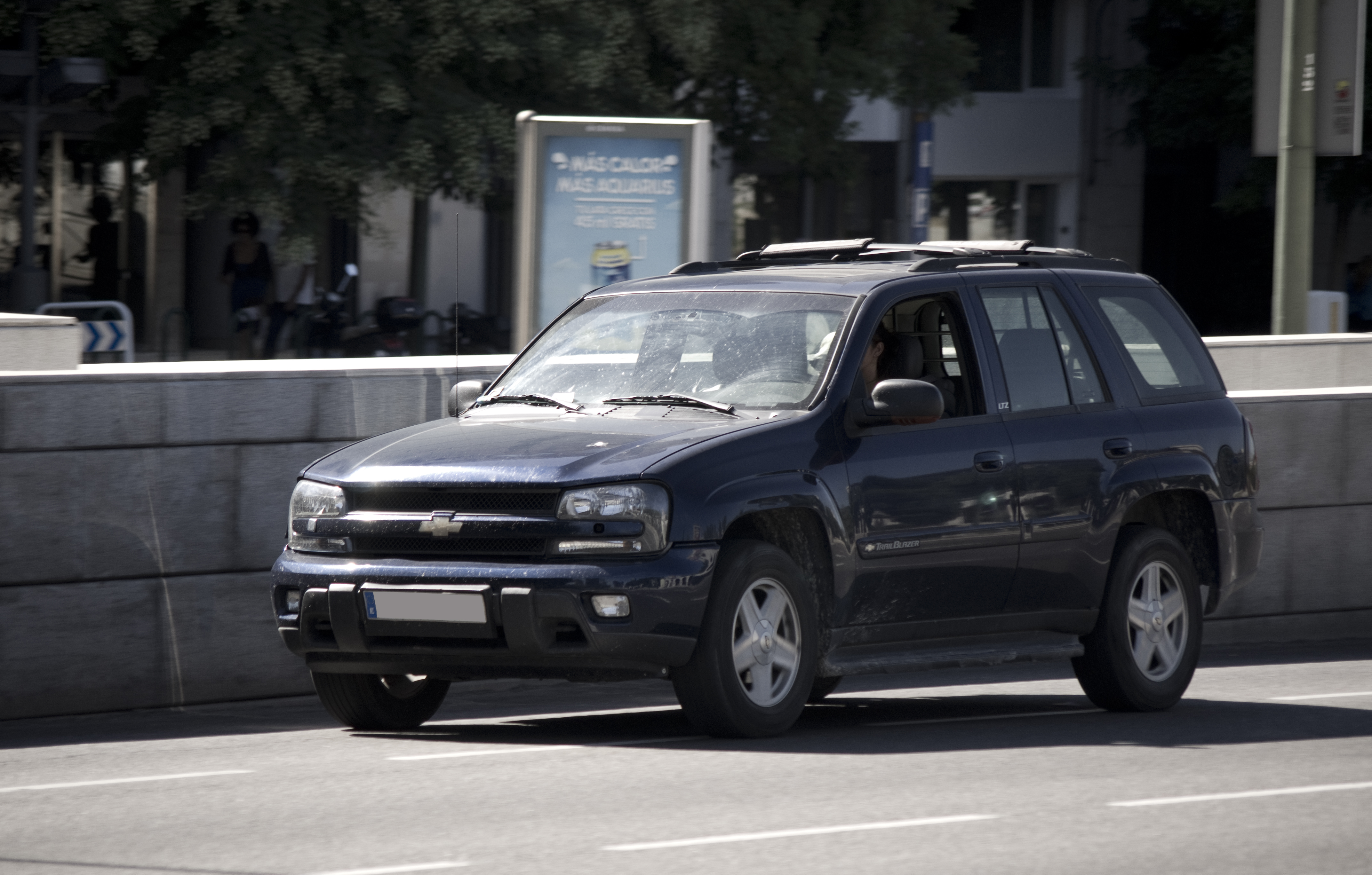 2003 Chevrolet Trailblazer